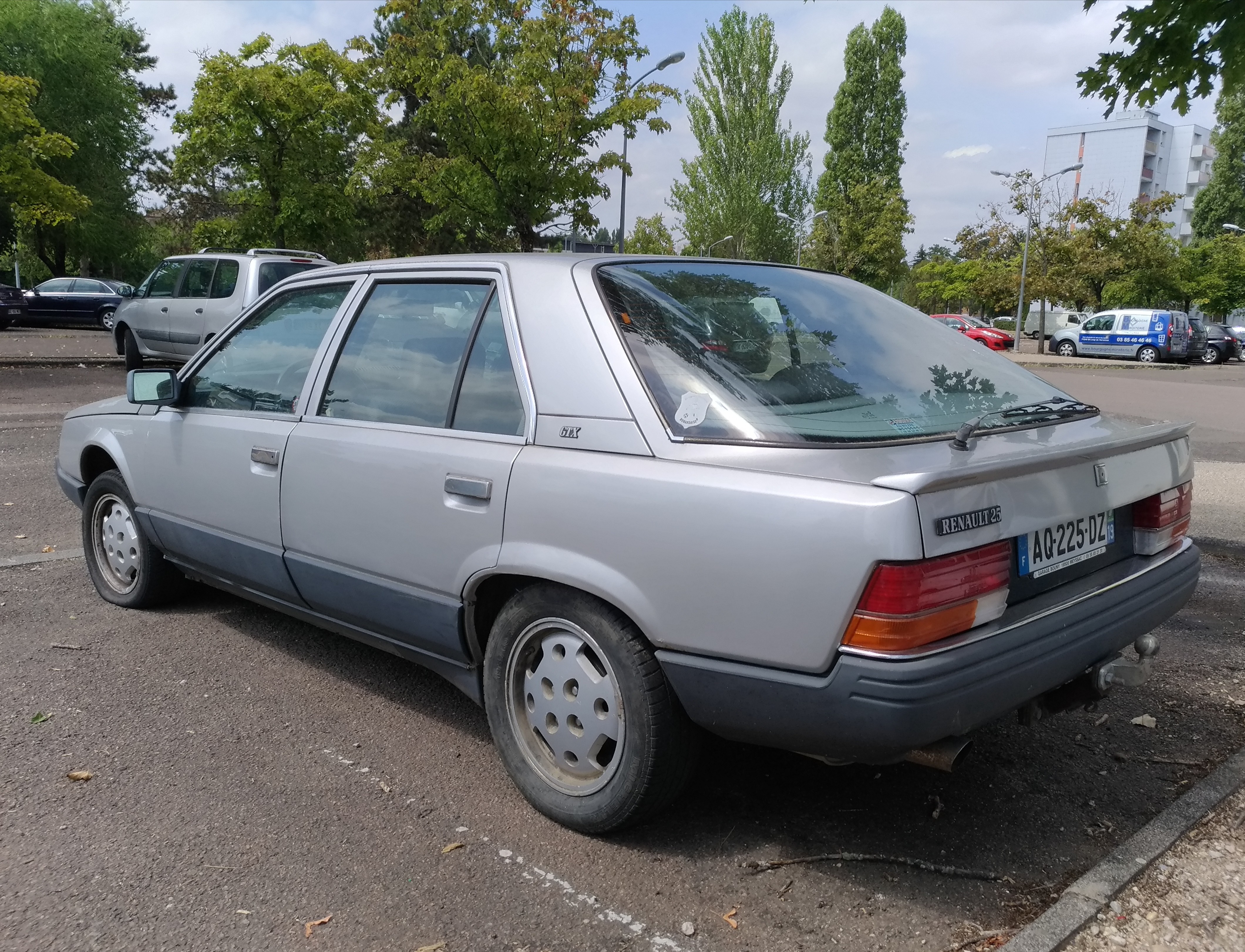 1985 Renault 25 (2.2 123 hp) at Chalon sur Saône